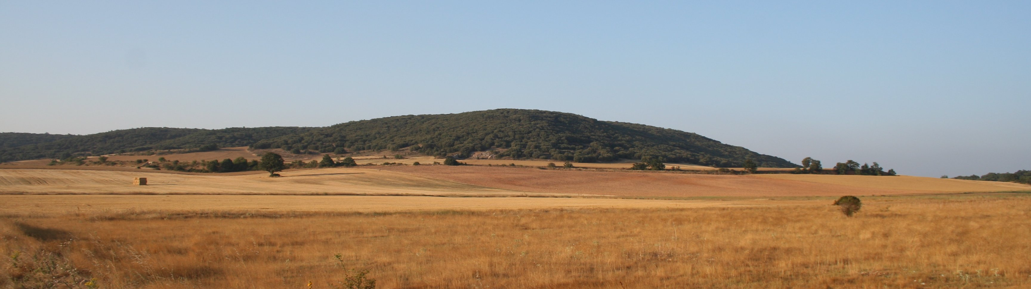 Panorámica de la Sierra de Atapuerca